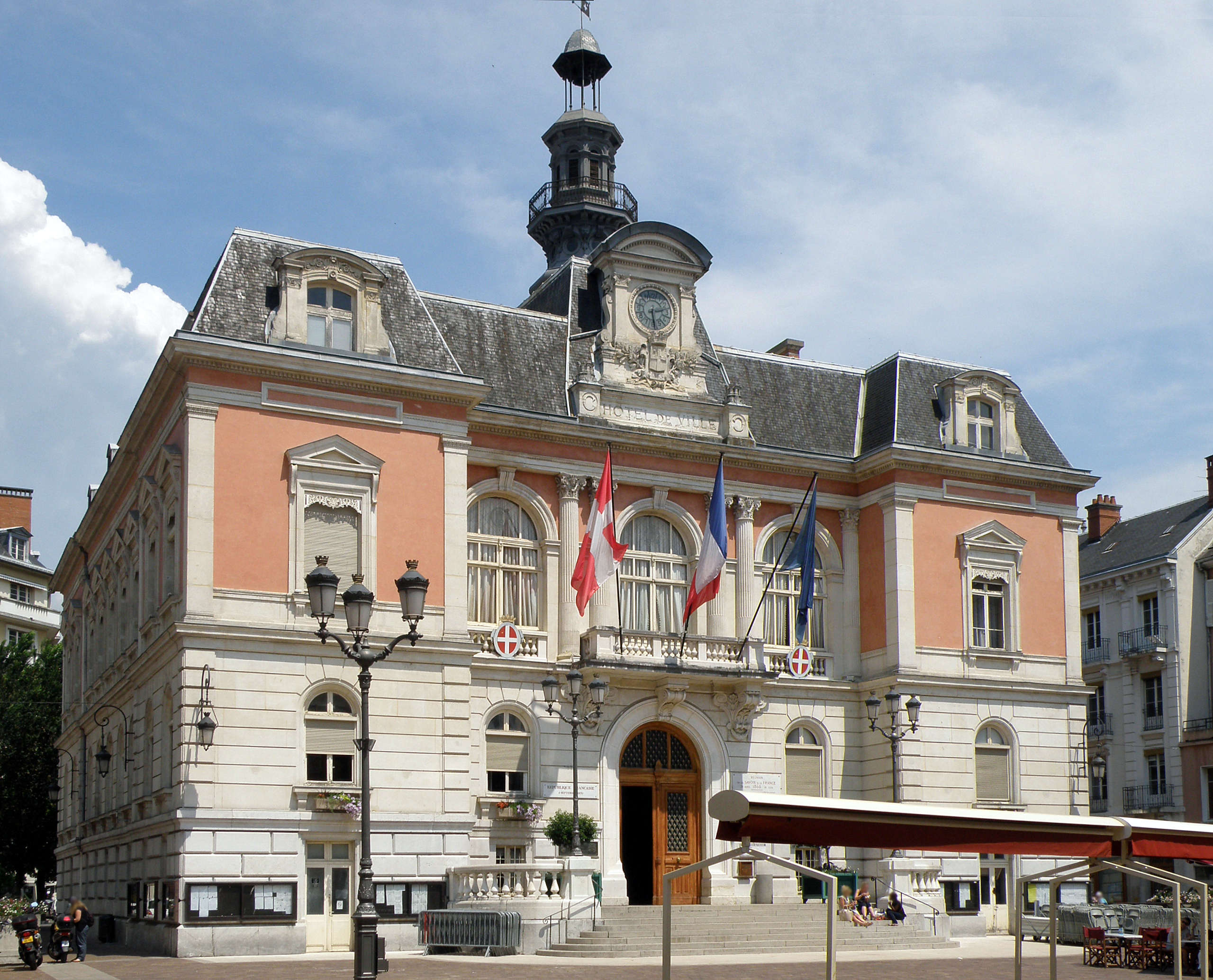 Chambéry, ville et préfecture du département de la Savoie (région Rhône-Alpes, France). Hôtel de ville.